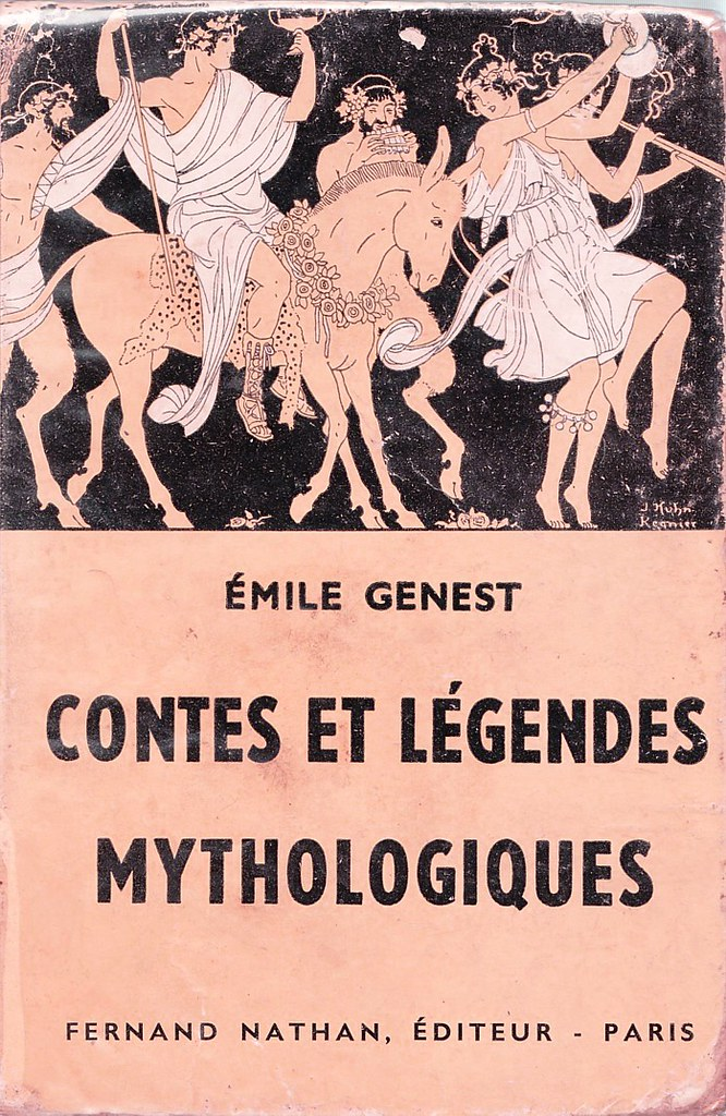 from Contes et légendes mythologiques (1936)